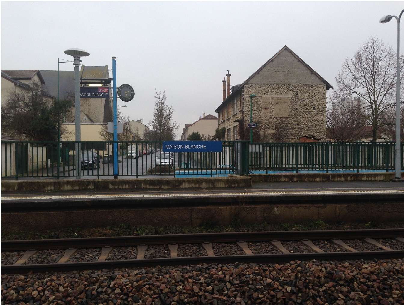 Gare de Reims-Maison-Blanche-2016